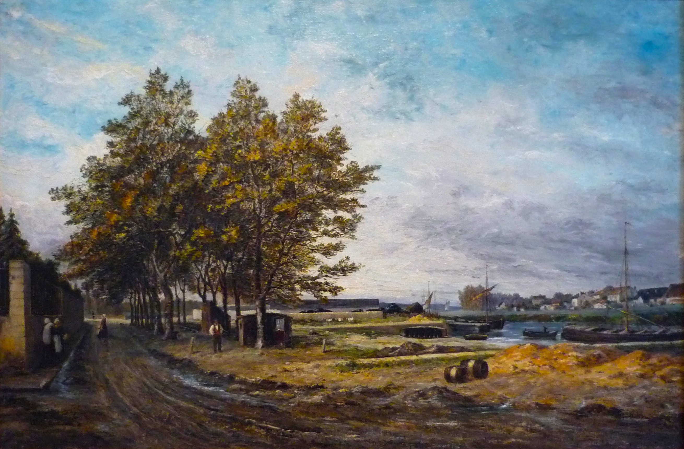 Henri Germain (1842-1898) : La cale de Cognac après la pluie, huile sur toile (1880), Musée d'art et d'histoire de Cognac, Charente, France.